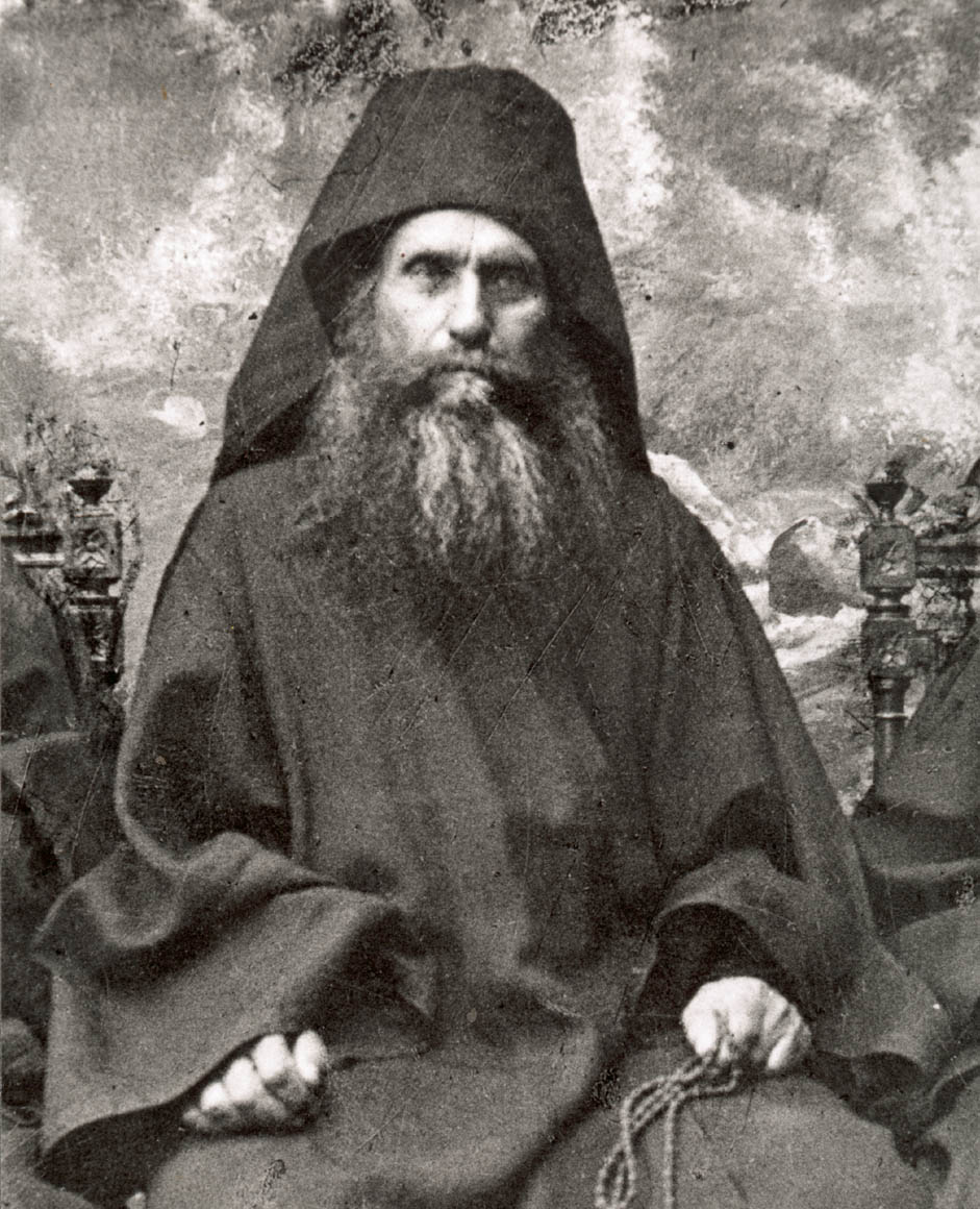 Преподобный Силуан Афонский. Фото 30-e годы XX века